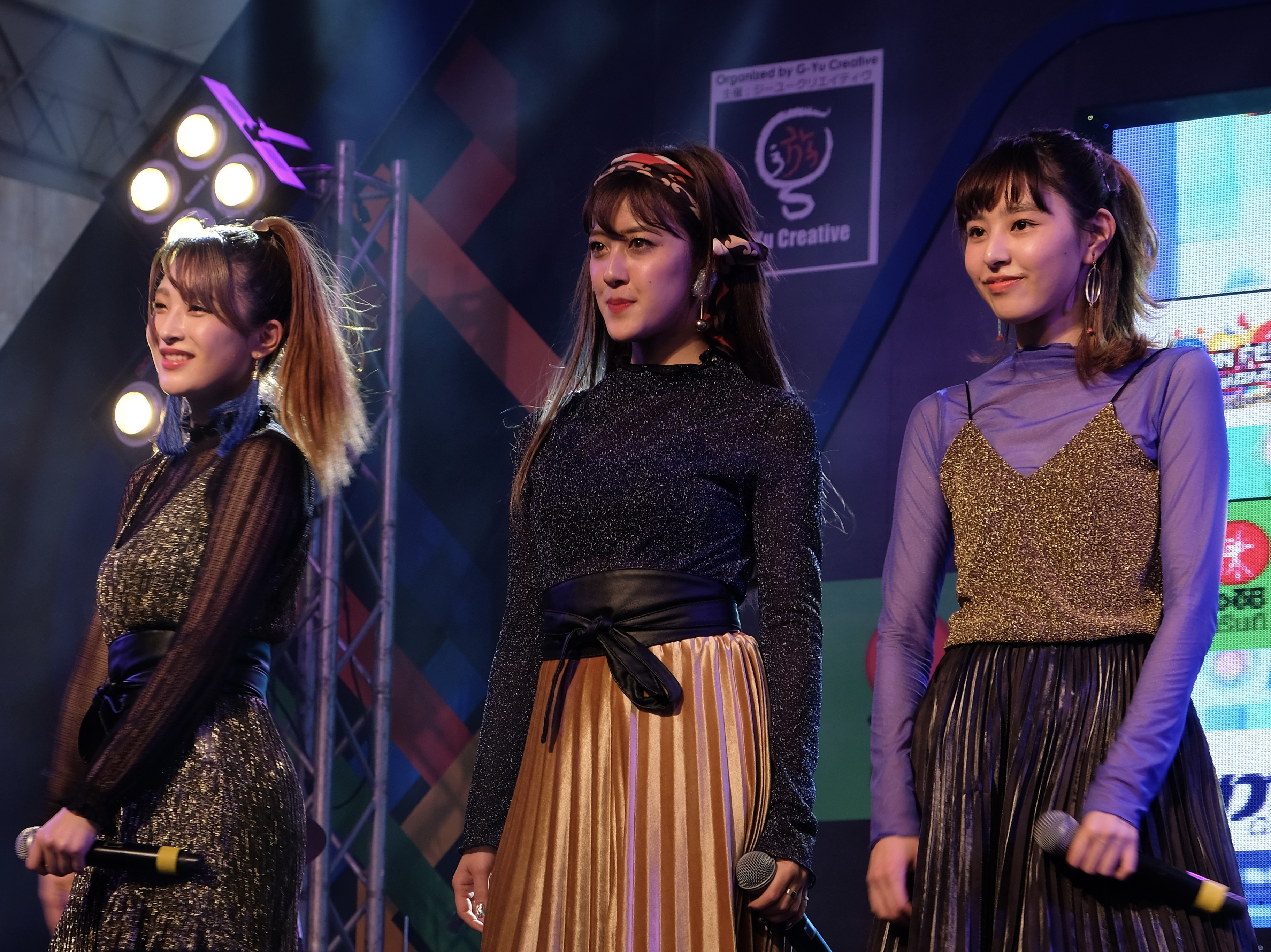 JAPAN EXPO THAILAND 2017